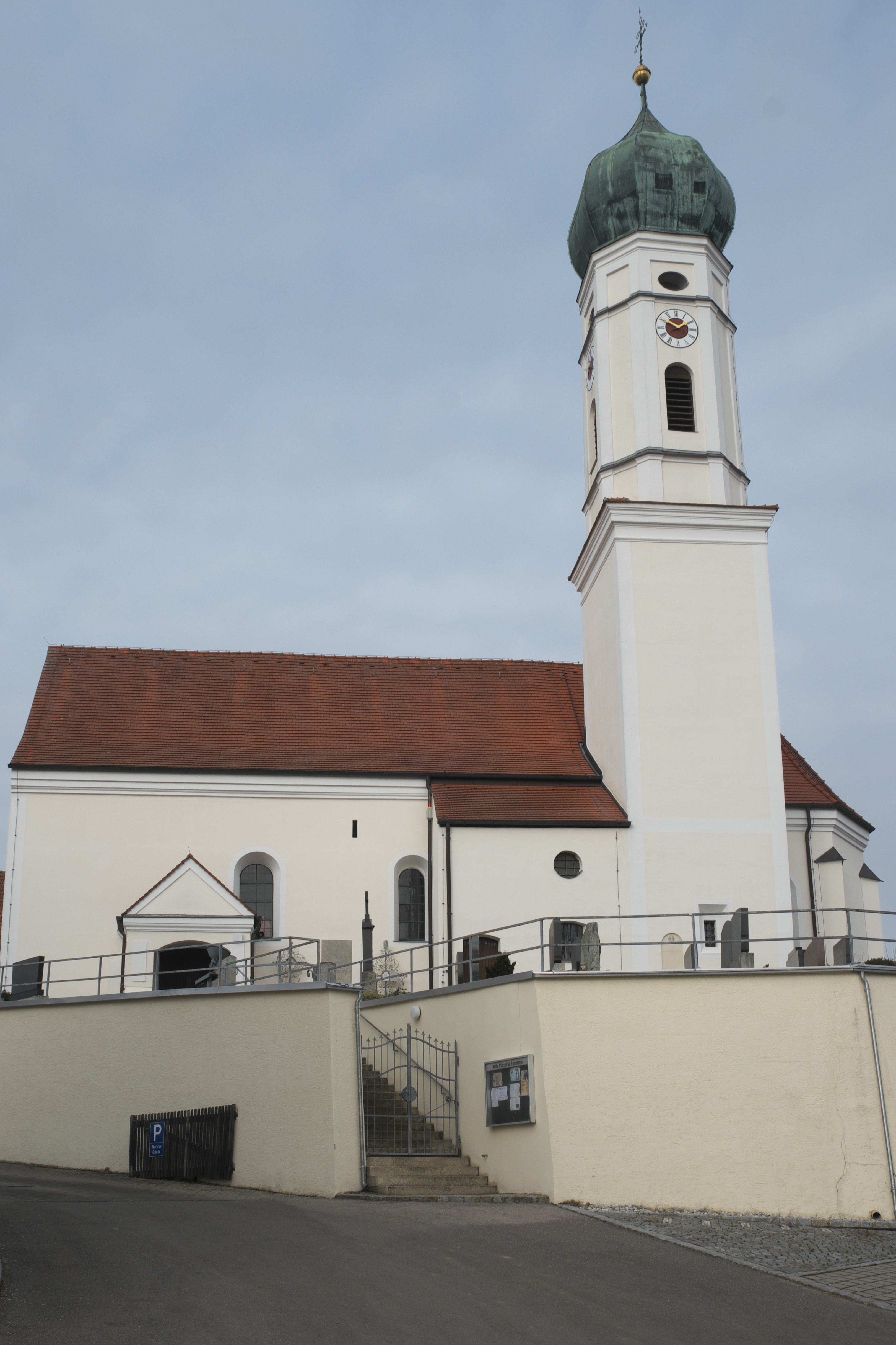 Katholische Pfarrkirche Sankt Emmeram in Geisenhausen (Schweitenkirchen) im oberbayerischen Landkreis Pfaffenhofen an der Ilm (Bayern/Deutschland)